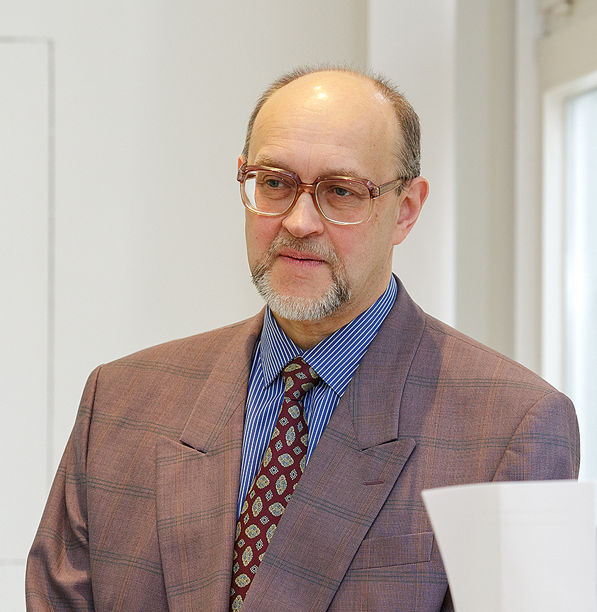 Володимир Потульницький під час виступу в науковому семінарі Гердерівського інституту Центрально-Східної Європи у Марбурзі